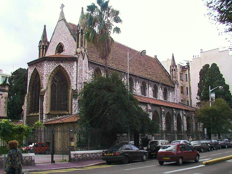 Nice-Quartier des Musiciens Rue de la Buffa